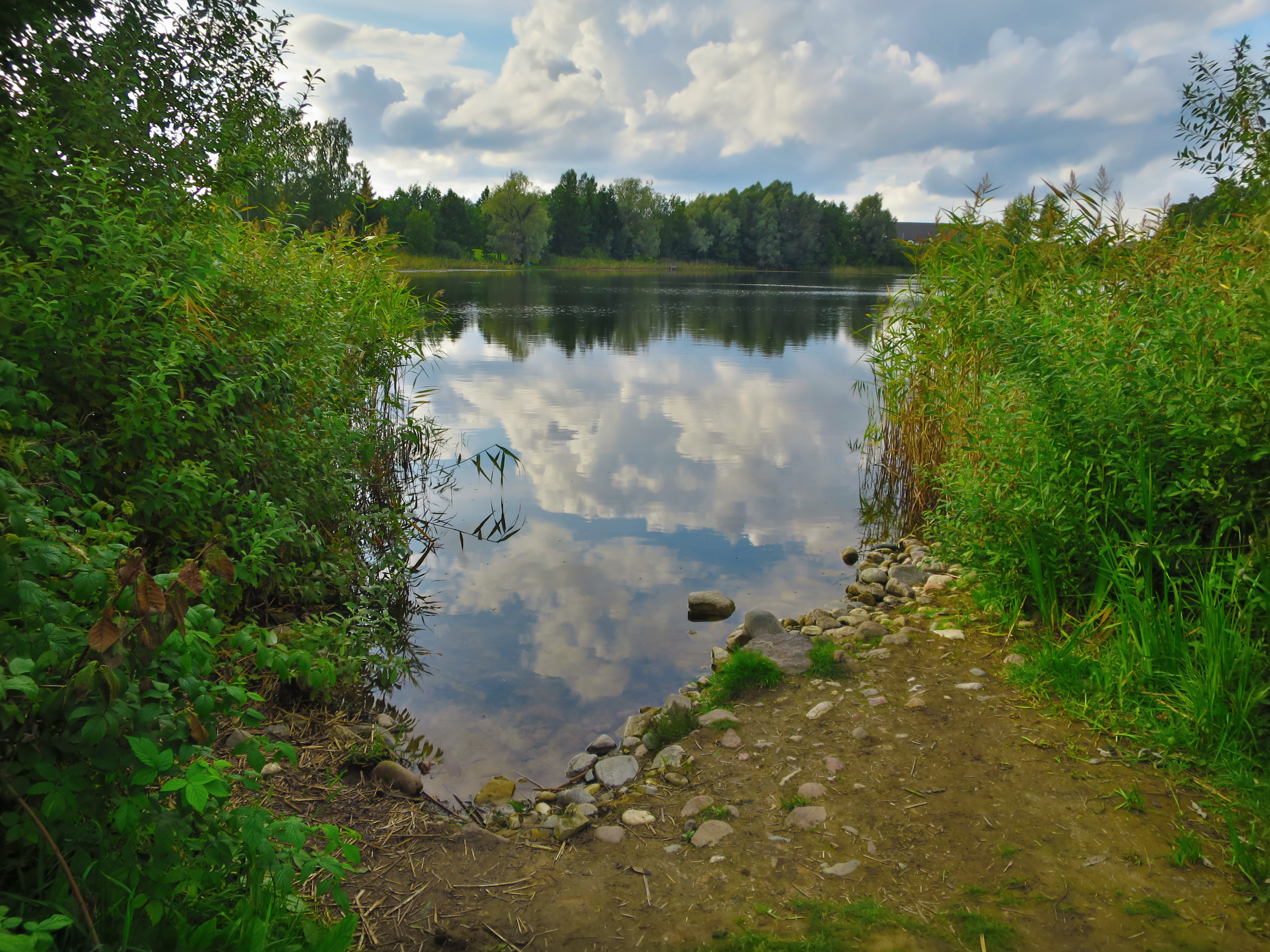 Vellavere Kogrejärv Tartumaal